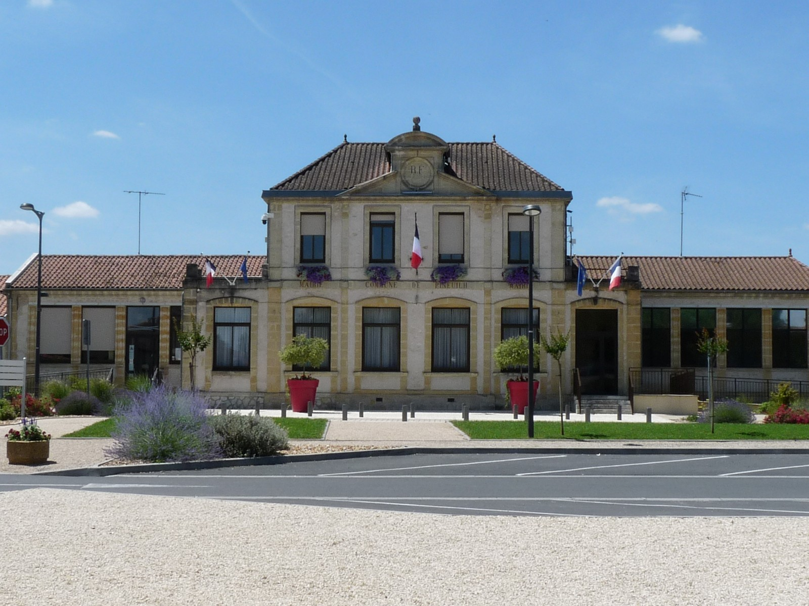 Mairie de Pineuilh, Gironde, France